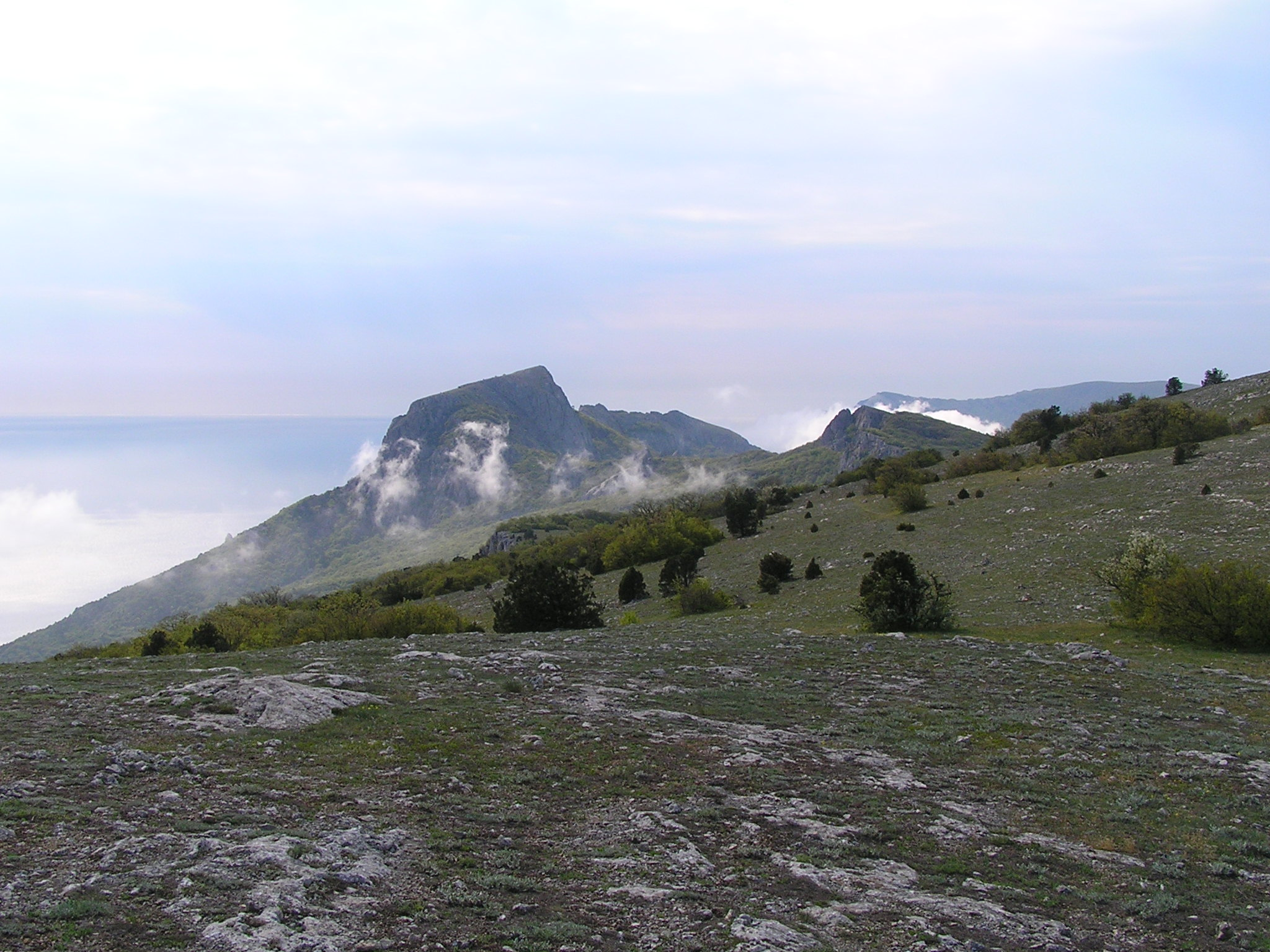 Заповідне урочище «Скелі Ласпі» у адміністративних межах м. Севастополя (Балаклавський район)